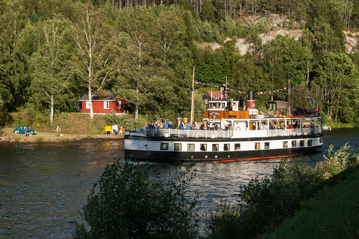 MS Victoria mellom Kviteseidbrui og Sundebrui på vei inn mot Kviteseidbyen.